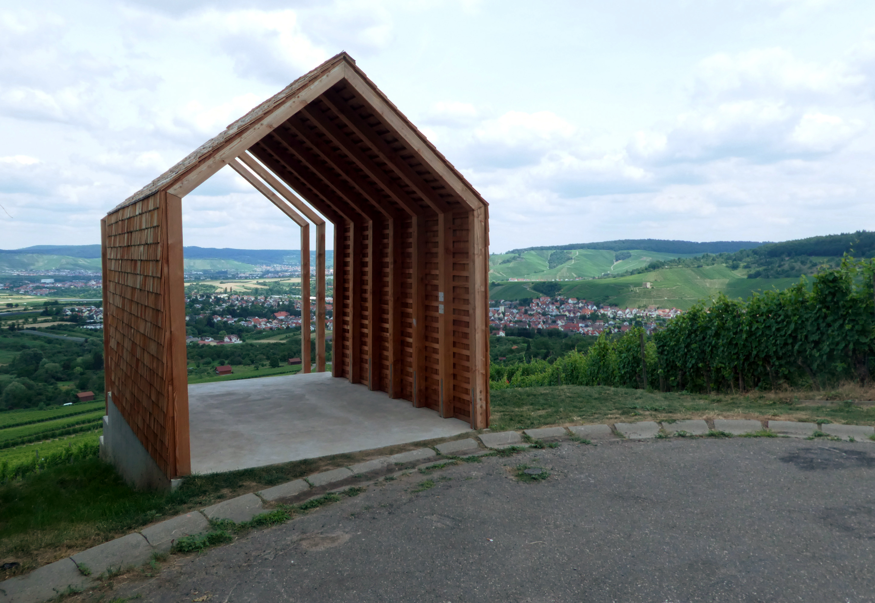 Kernen im Remstal - "Wengerter Häuschen". Das Bauwerk entstand als Station 13 der "16 Stationen" der Remstal-Gartenschau 2019.